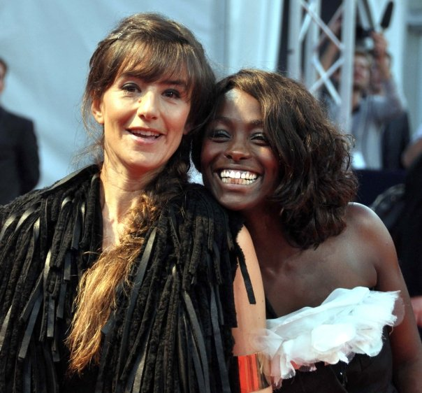 Romane Bohringer et Aïssa Maïga au festival de Deauville 2009